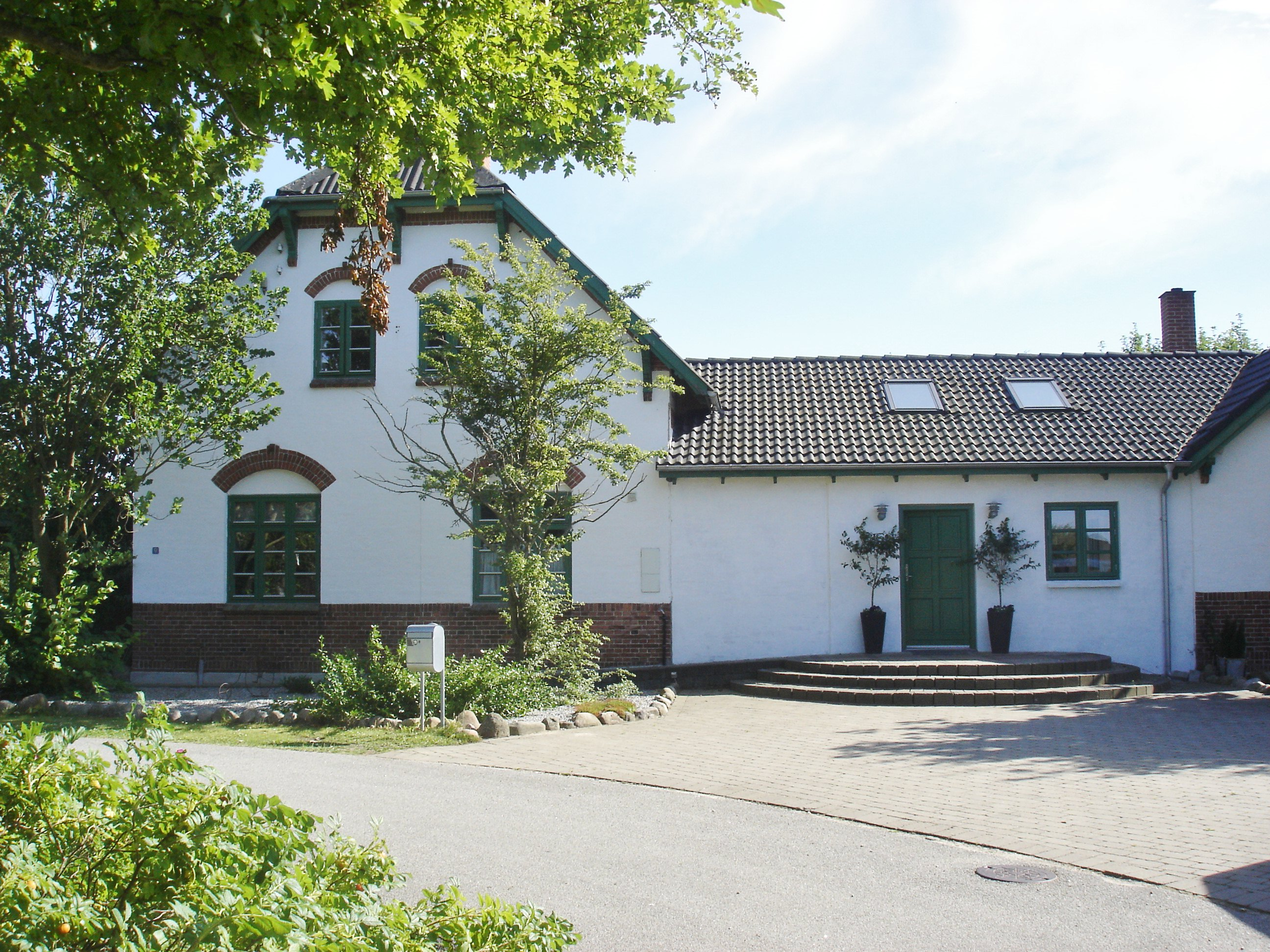 Hunstrup Station